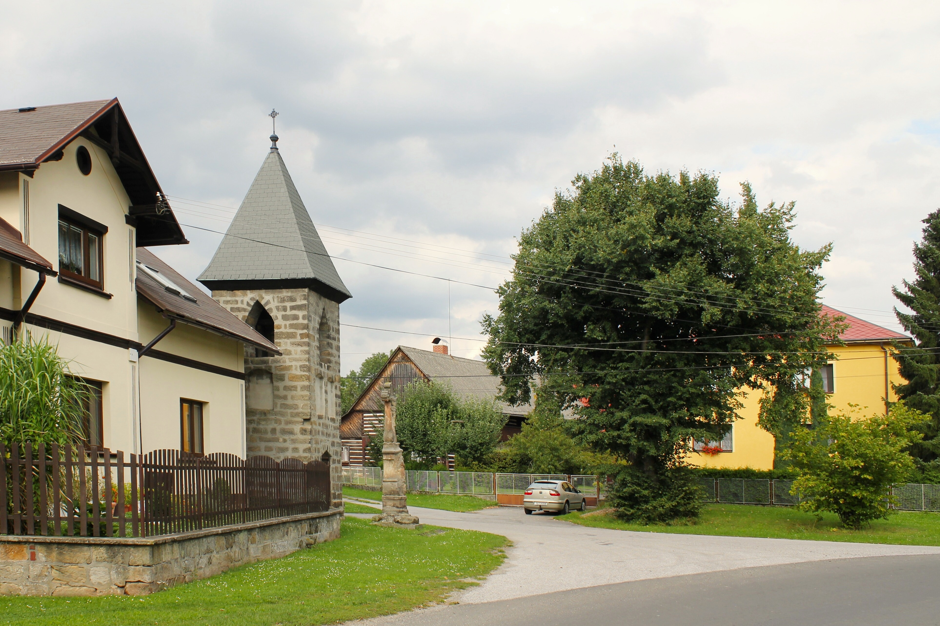 Modřišice